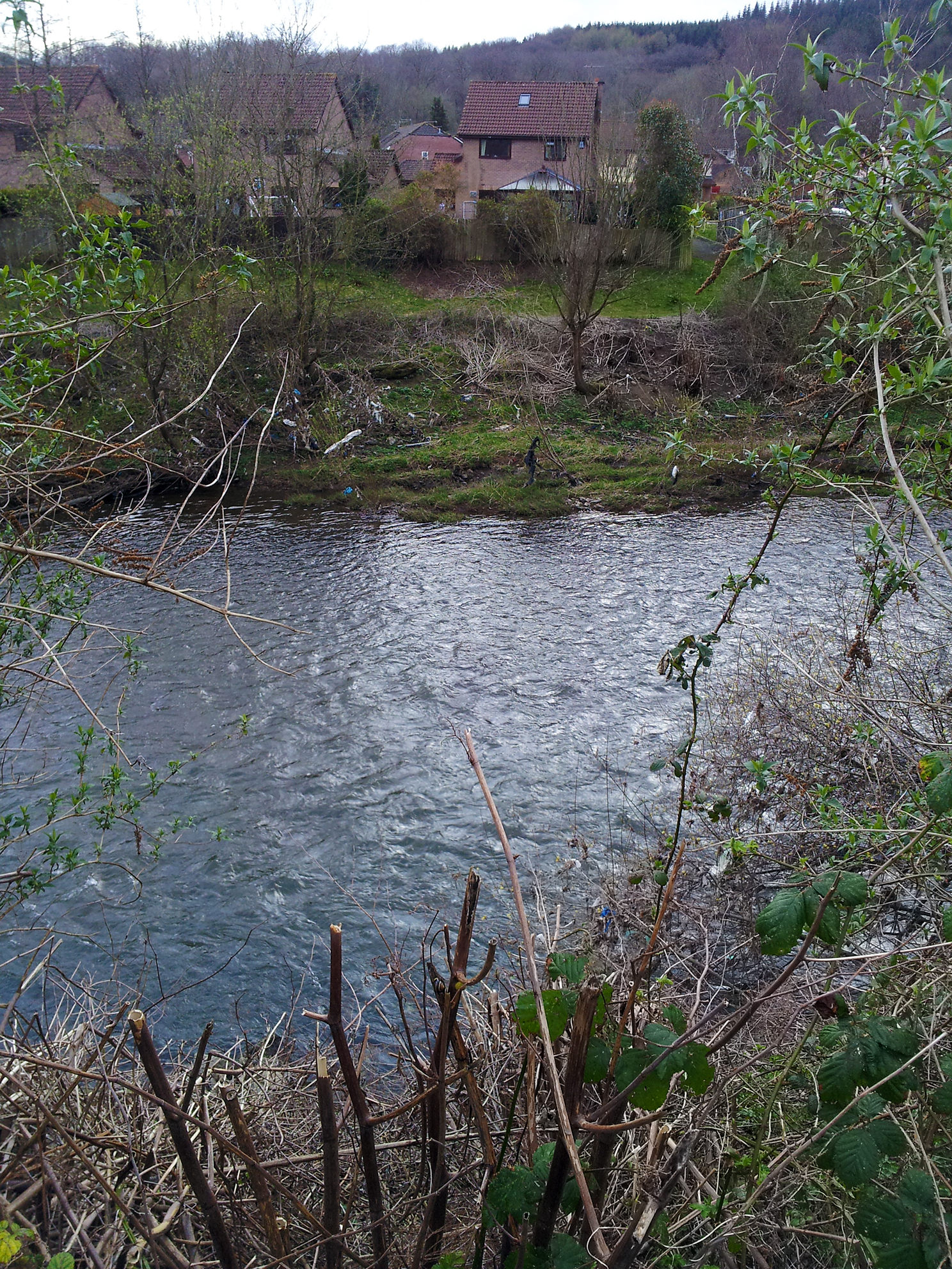 La rivière Taff à son passage à Taff's Well (Rhonda Cynon Taf).